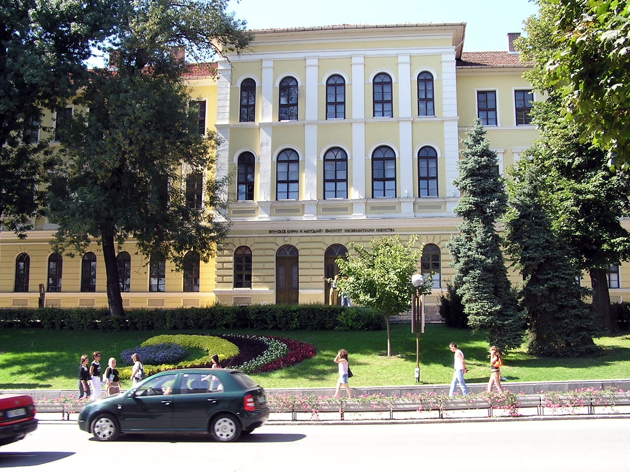 Велико Търново